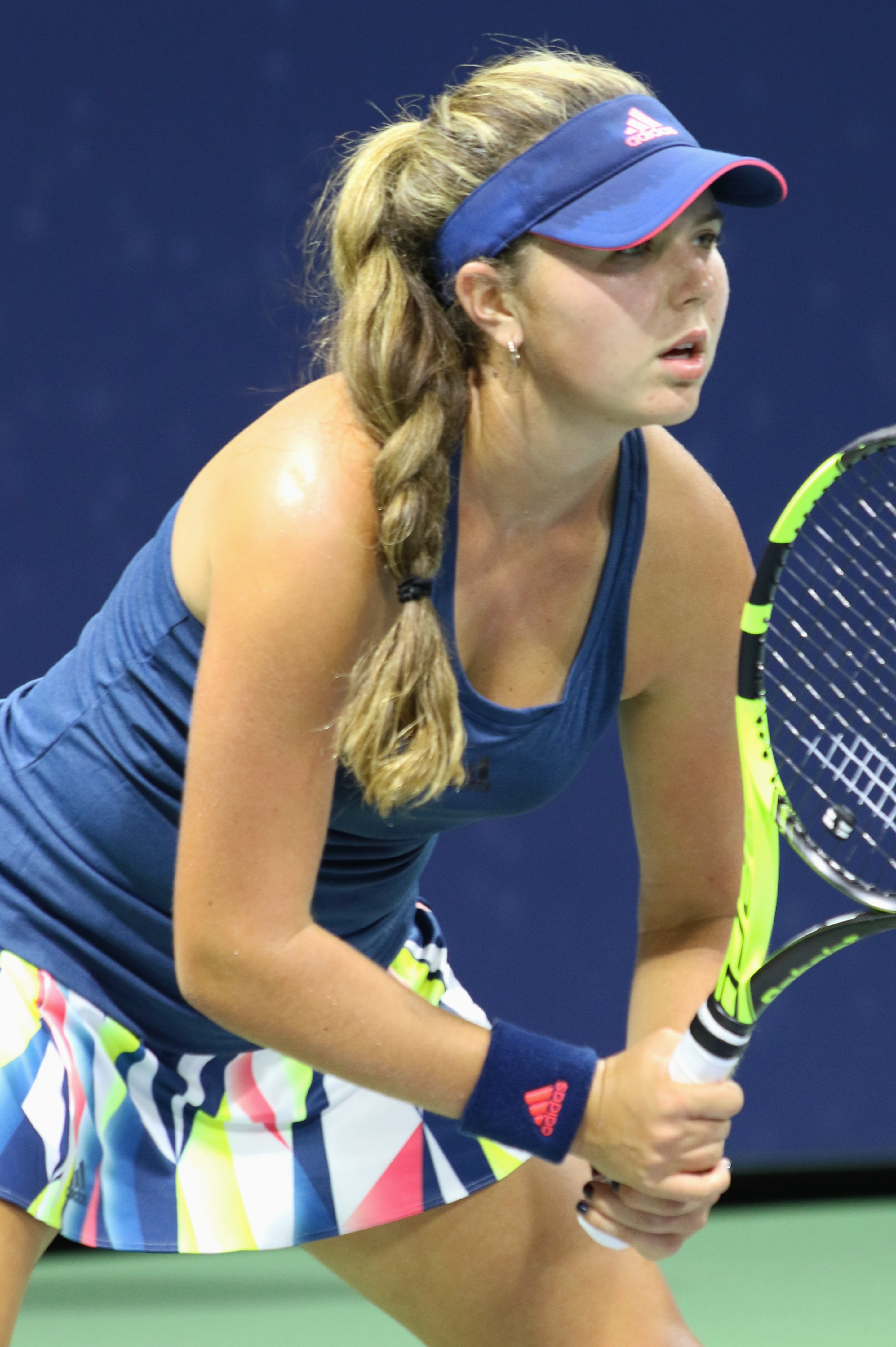 Day US16 (14)